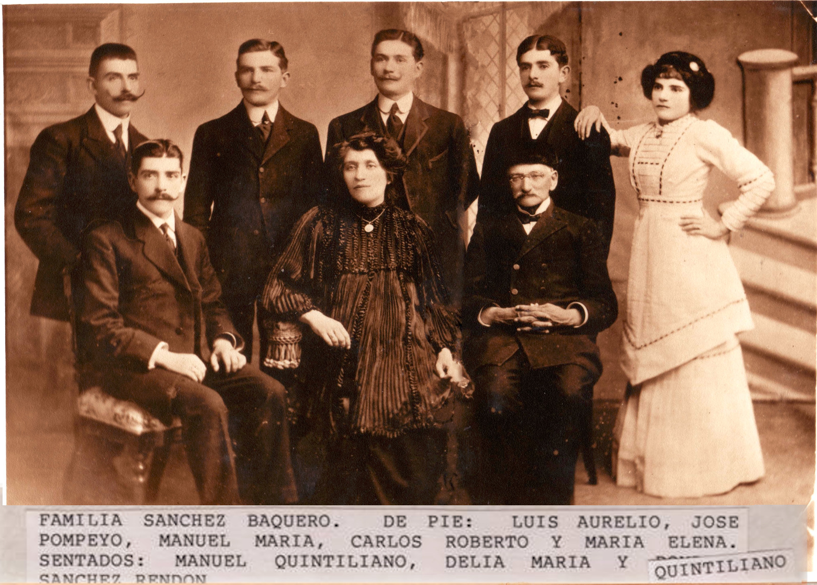 foto familiar